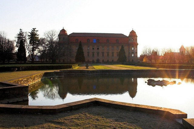 Zámek Holešov, na kterém probíhá Letní škola barokní hudby